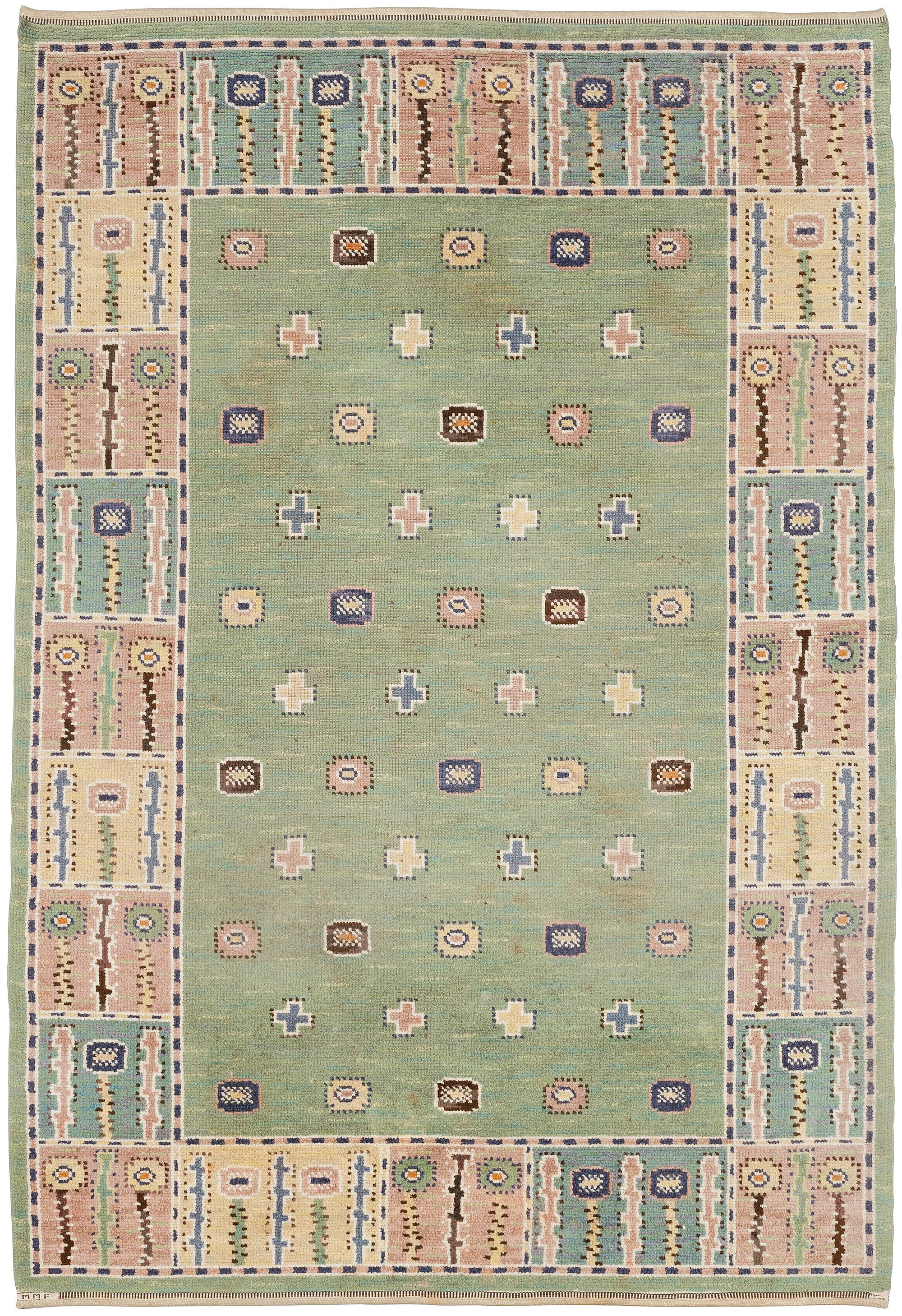 szwedzki dywan "Algo" zaprojektowany przez Märta Måås-Fjetterström z kolekcji Doris Leslie Blau